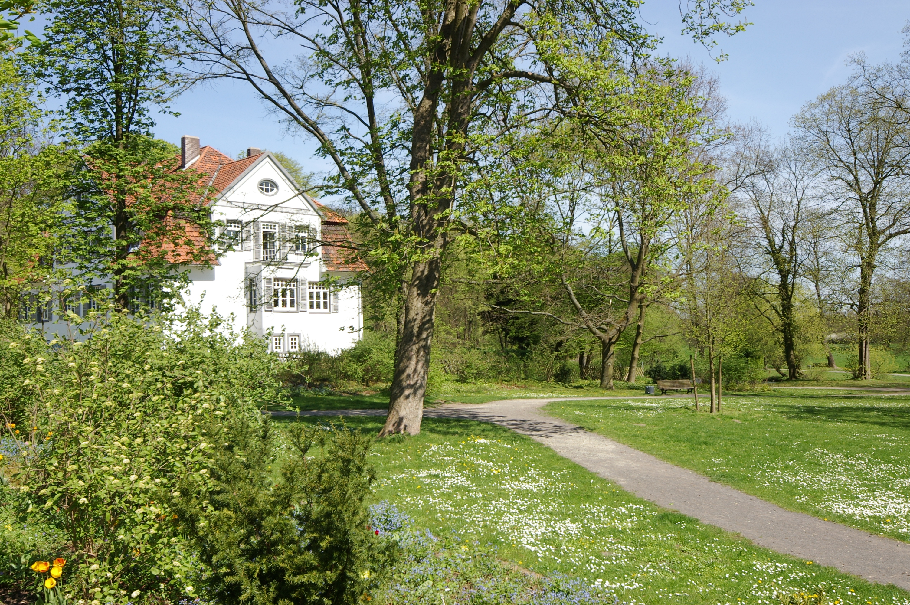 Hannover - Marienwerder - Am Hinüberschen Garten. 2005-04-20